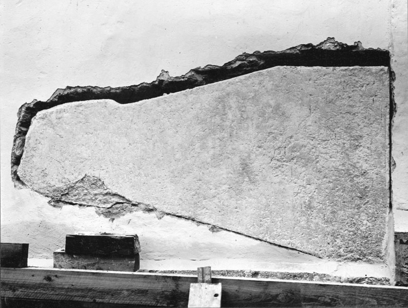 Bildsten borttages i muren.